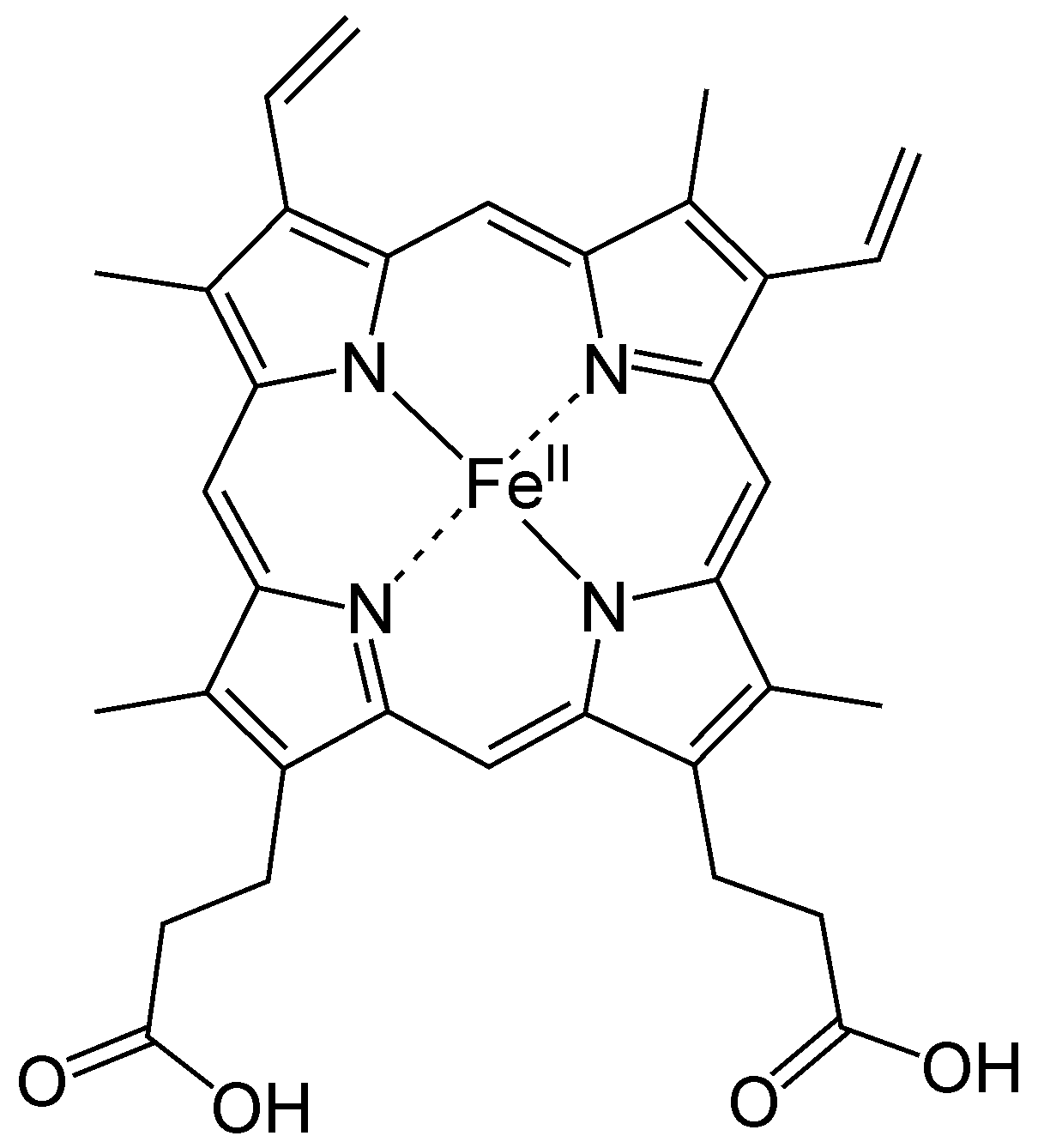 Häm b; heme b